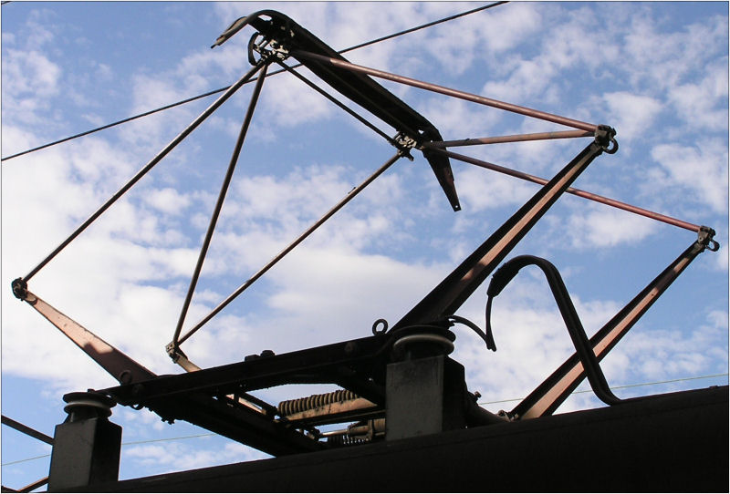 Odbierak prądu - pantograf